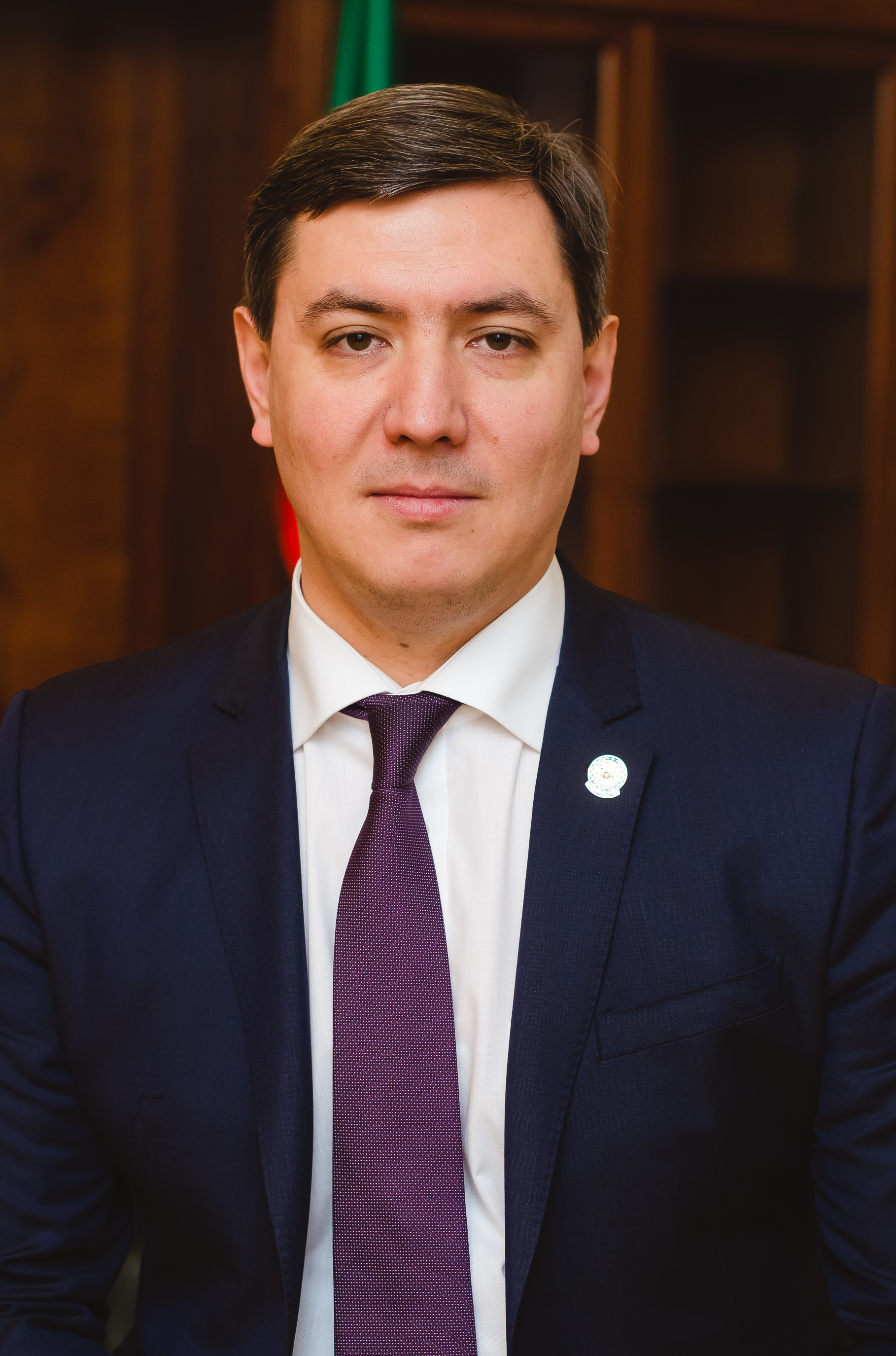 Министр информатизации и связи Республики Татарстан